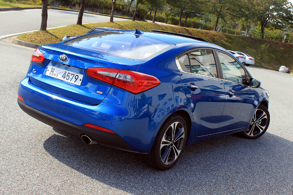 기아자동차 K3 후측면